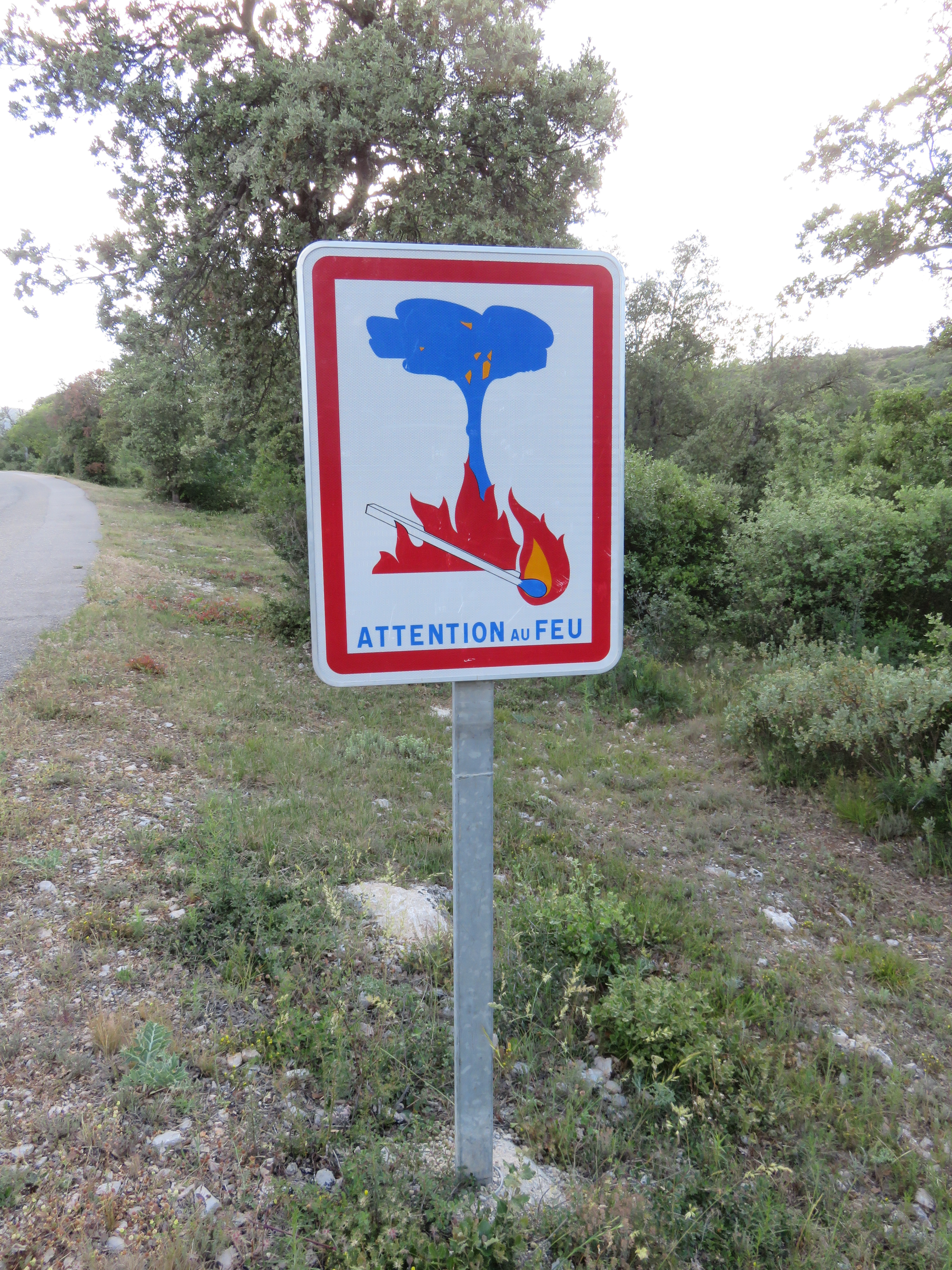 Panneau routier de prevention des incendies de vegetation dans le massif de la Sainte-Victoire.